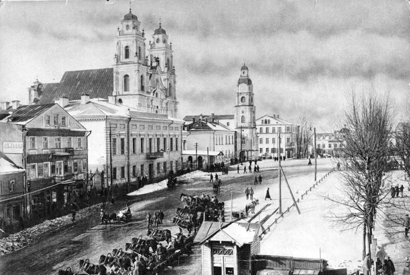 In Minsk.- Die polnische Kirche mit dem Gouvernementsgebäude auf dem Friedensplatz.